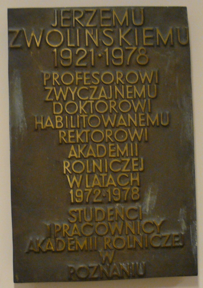 Jerzy Zwoliński Plaque, Poznań, Collegium Maximum.